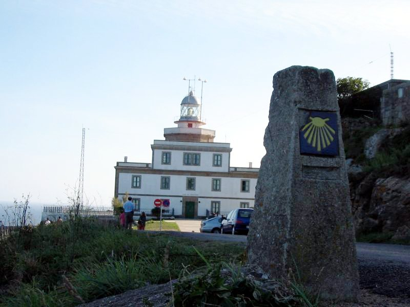 Faro de Fisterra, Fisterra, A Coruña, Galiza